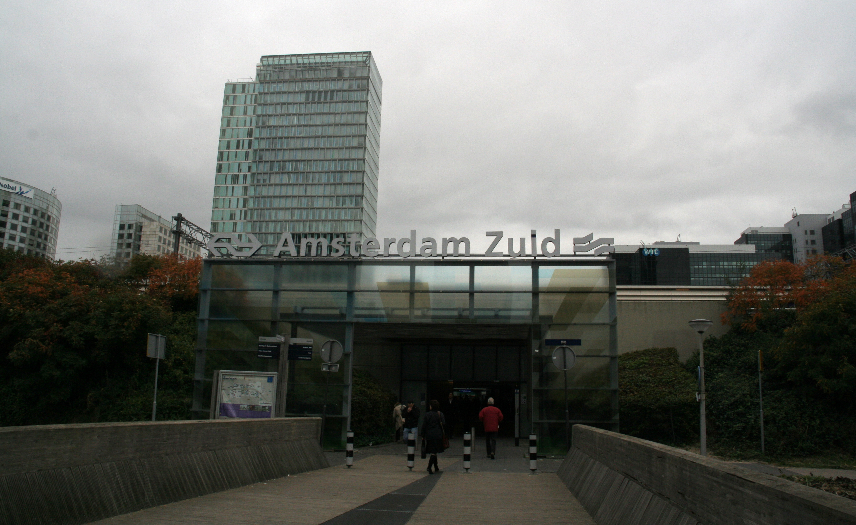 Toegang zuid van Station Amsterdam Zuid.